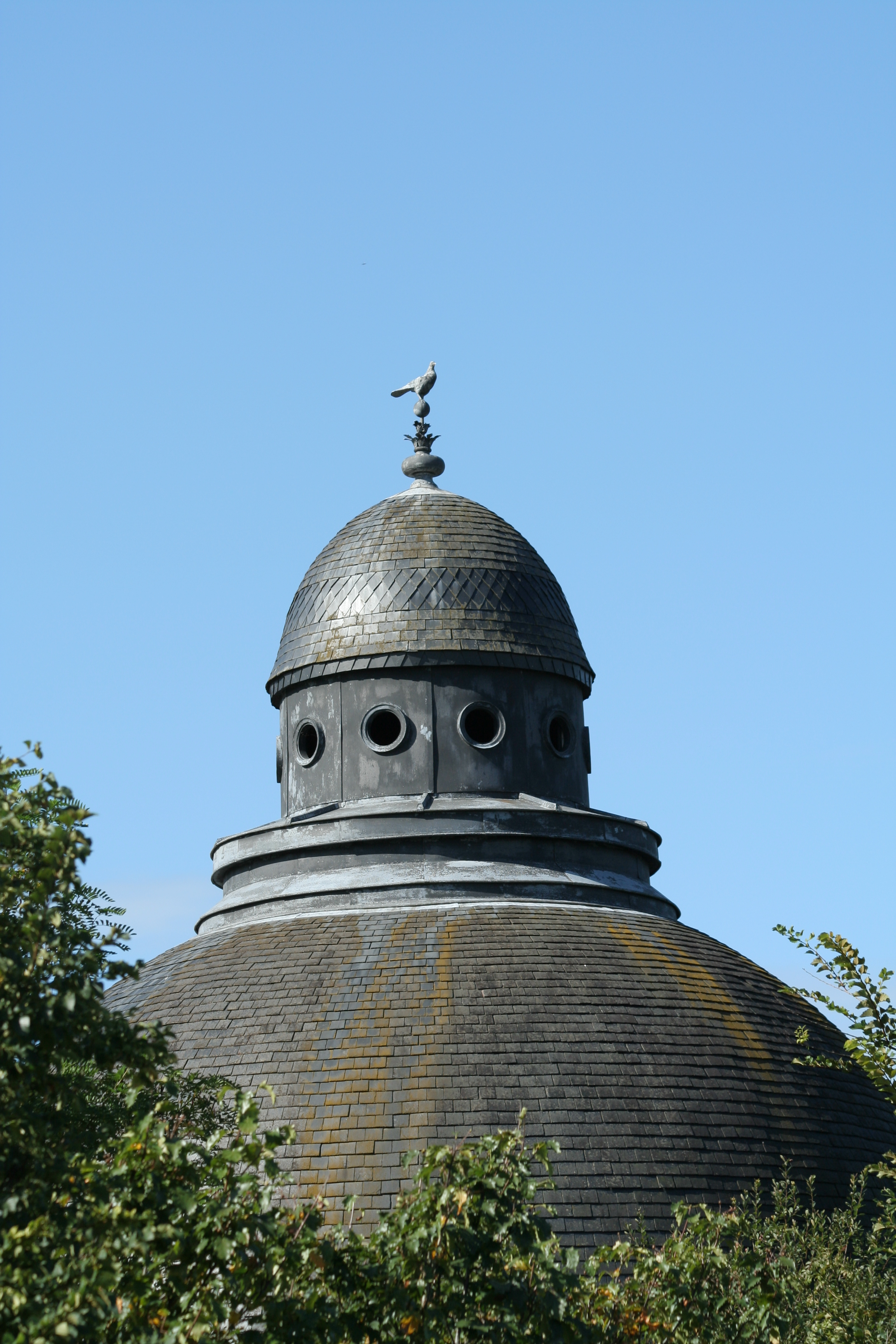 Pigeonnier du château de Thouaré-sur-Loire